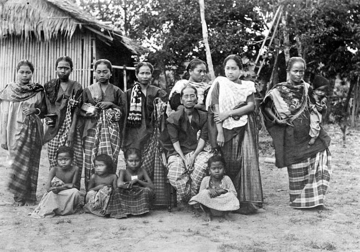 Repronegatief. De vorstin van Parepare met gevolg, Zuid-Celebes